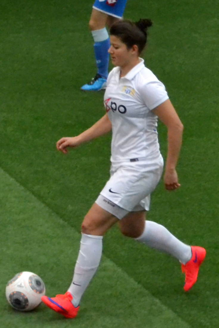 Gentjana Rochi, Probespielerin des FC Zürich, beim SAP Frauen-FußballCup 2016